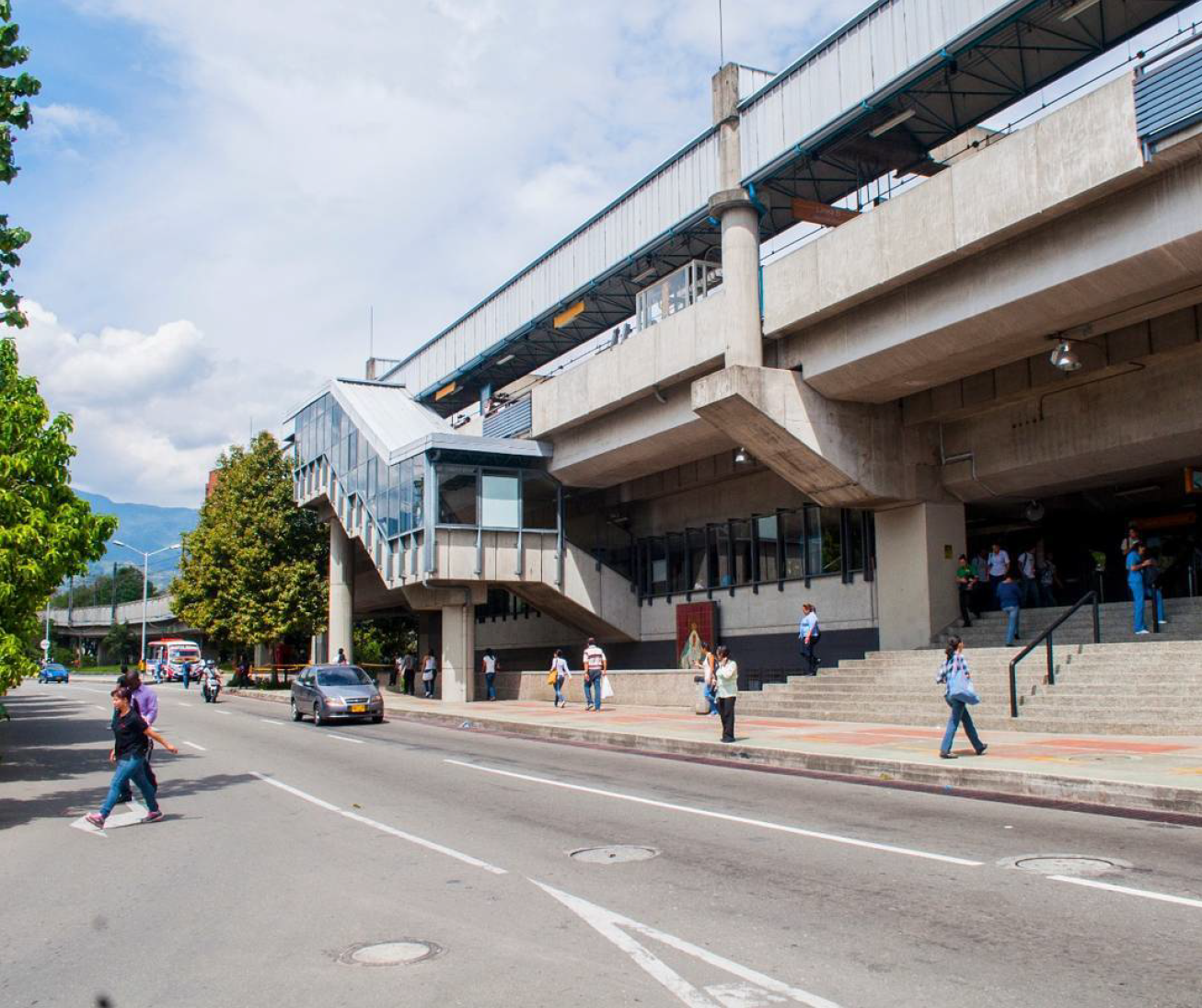 Estación Suramericana (Metro de Medellín)